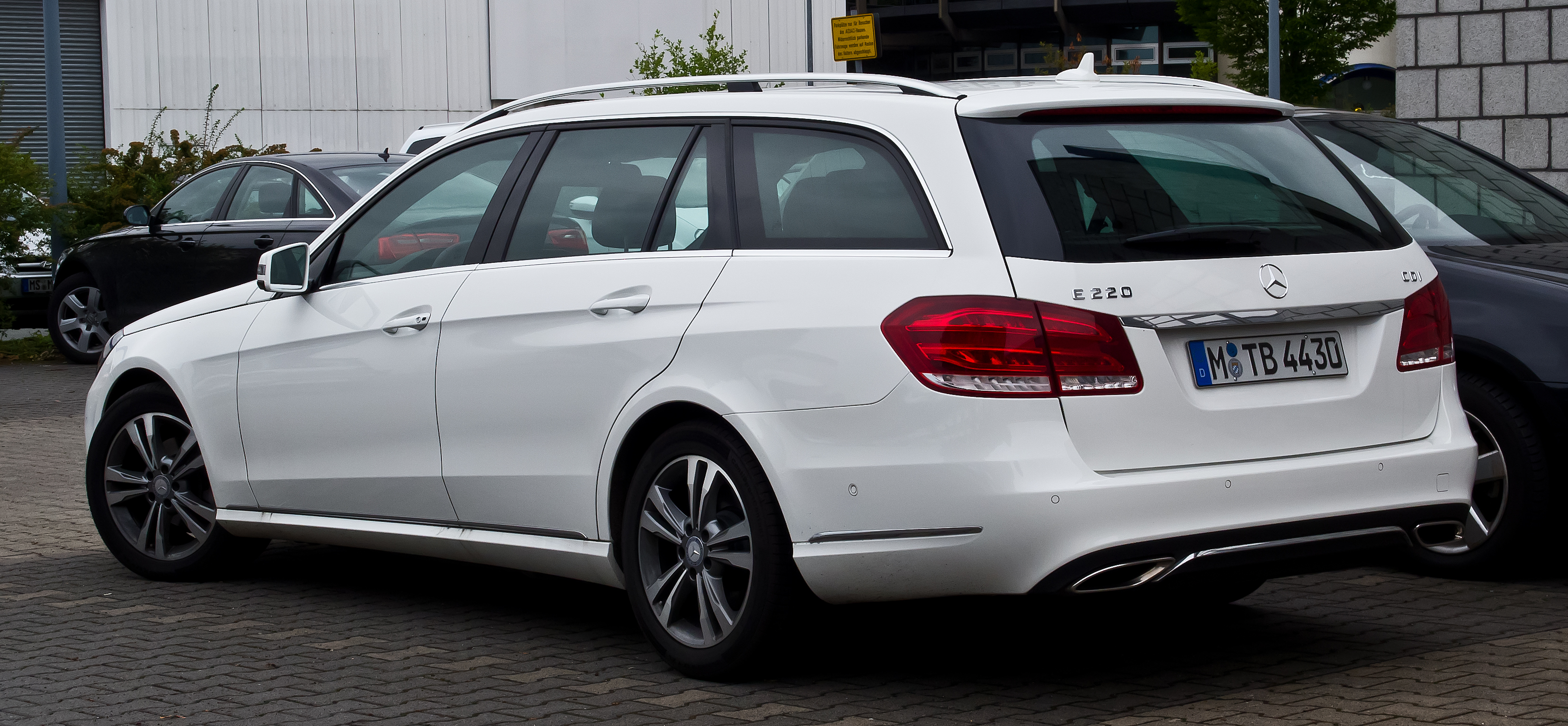 Mercedes-Benz E 220 CDI T-Modell Avantgarde (S 212, Facelift)